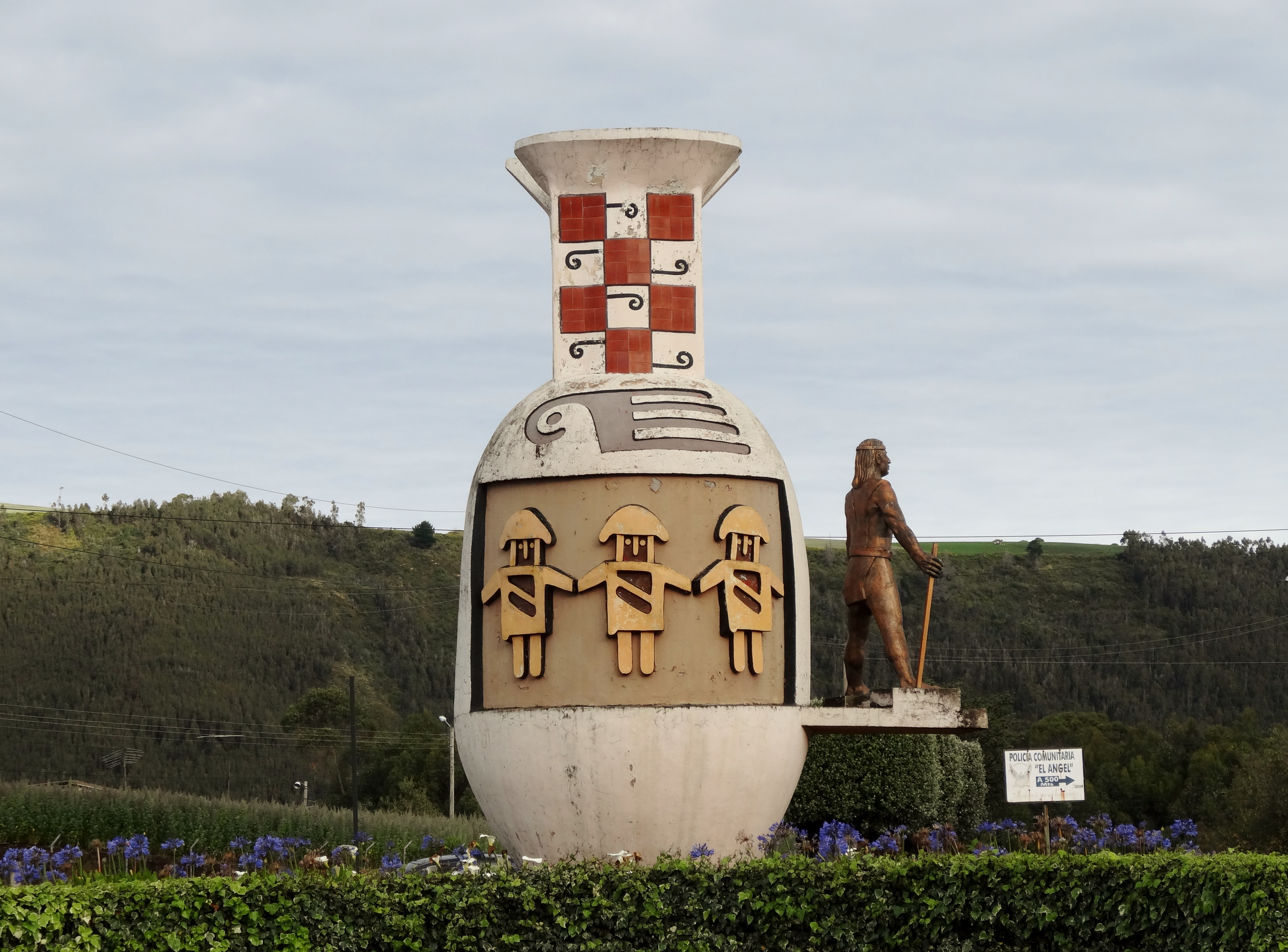 Botijuela·Escultor Freddy Mejía Velastegui